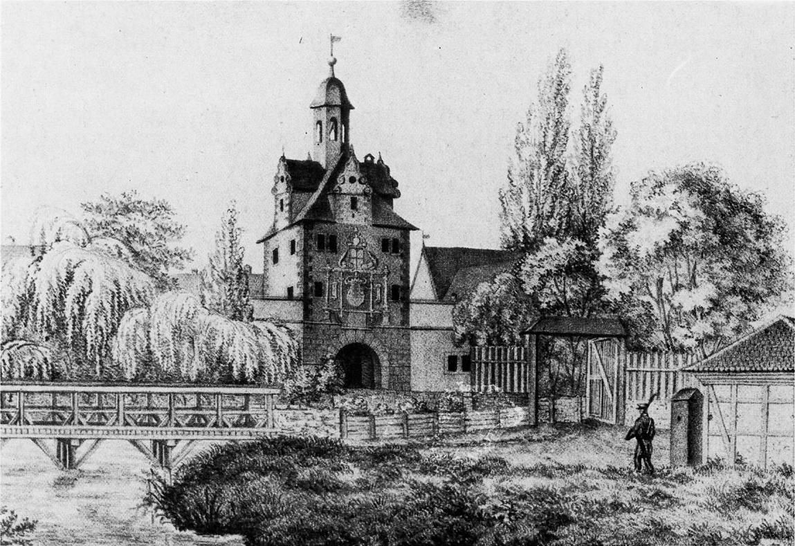 Ansicht des Kanaltores von Südwesten